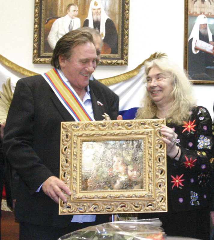 Елена Николаевна Флёрова с актёром Жераром Депардье